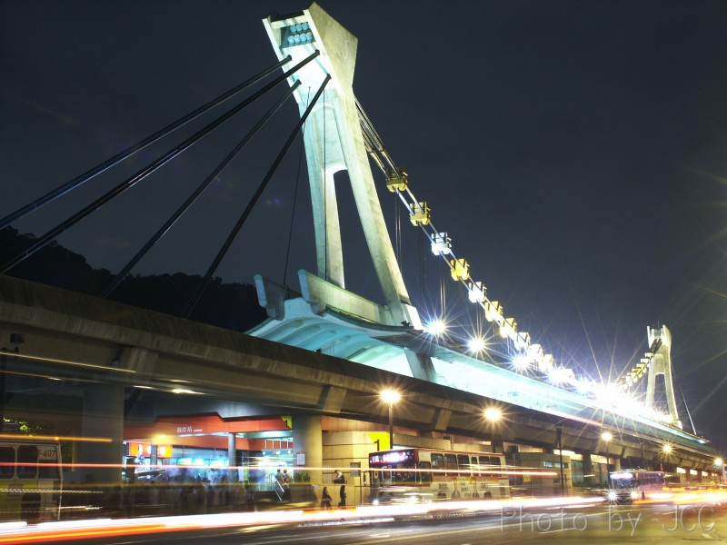 夜の台北捷運淡水線剣潭駅。中文（台灣）: 臺北捷運淡水線劍潭站夜景。Bân-lâm-gú: Tâi-pak-tsia̍t-ūn Tām-tsuí-suànn Kiàm-thâm-tsām ê iā-kíng.